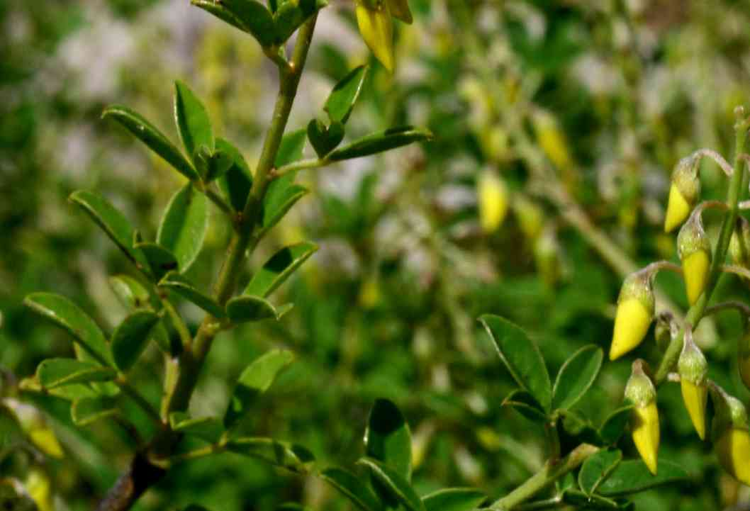 Cytisus nigricans (syn. Lembotropis nigricans; Citiso scuro) Giardino Botanico Alpino "Giangio Lorenzoni" (loc. Pian Cansiglio), Tambre d'Alpago (BL), quota 1000 m s.l.m.